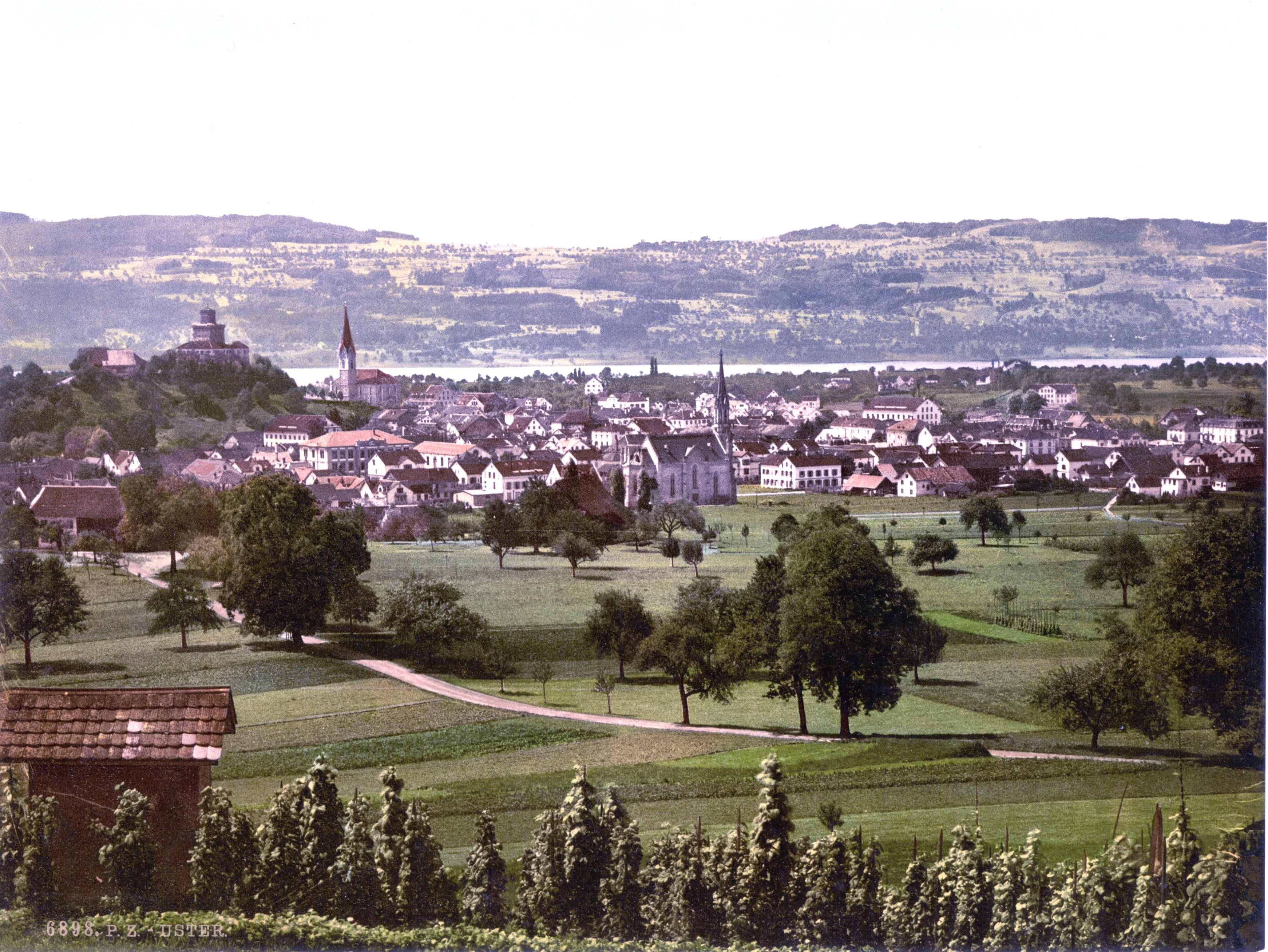 Uster/Schweiz um 1900